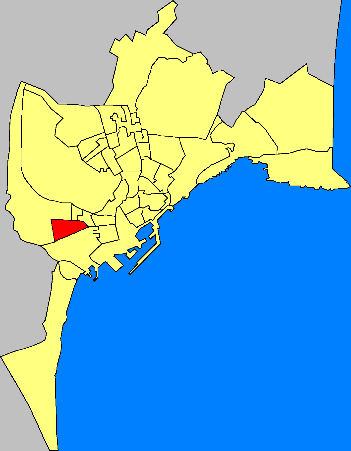 Barrios de la ciudad de Alicante